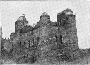 Iyassu I Castel in Fasil Ghebbi